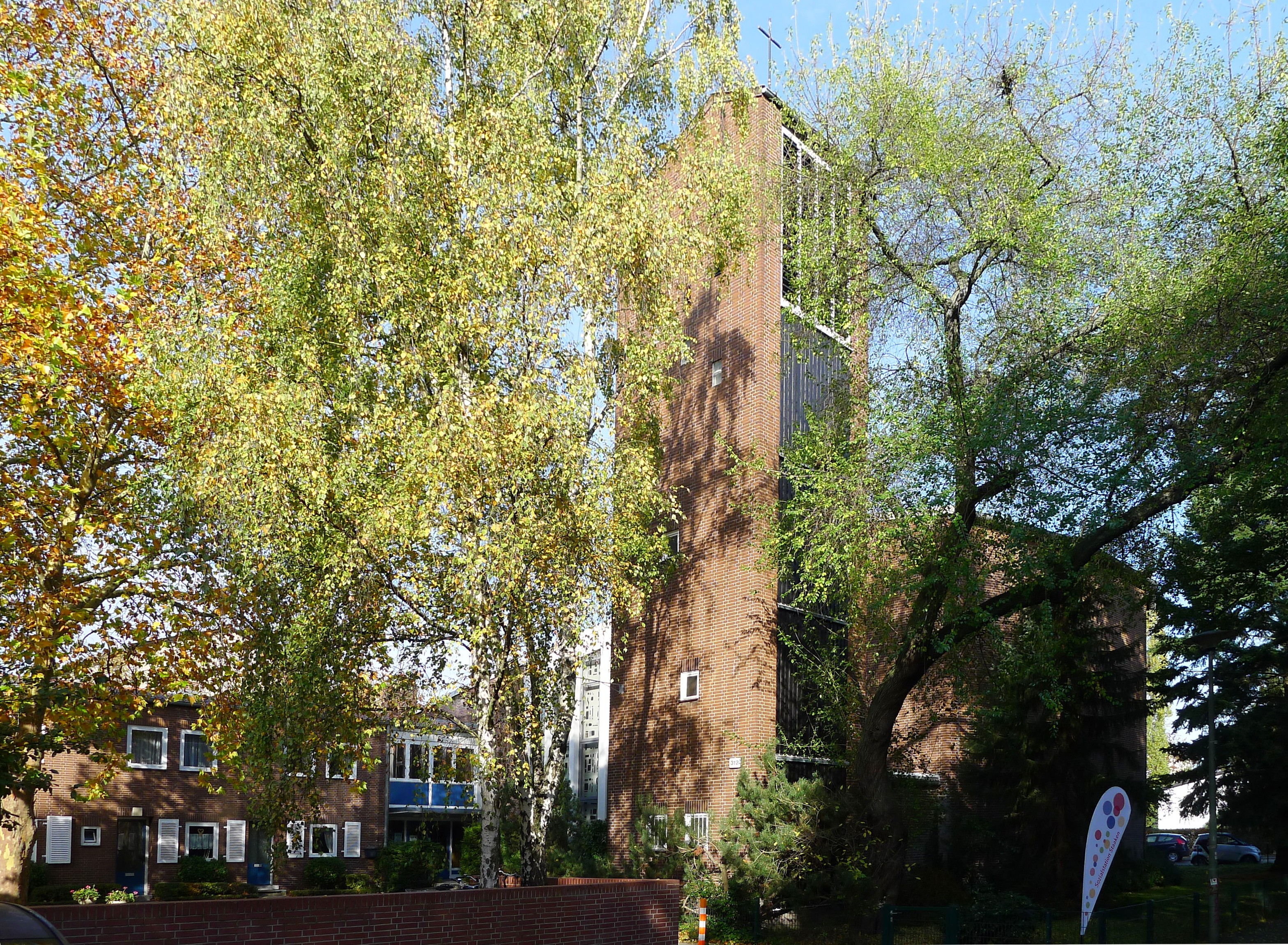 Hinter Bäumen versteckt befindet sich die Kirche, sodass sie vom Brunsbütteler Damm nicht zu sehen ist.